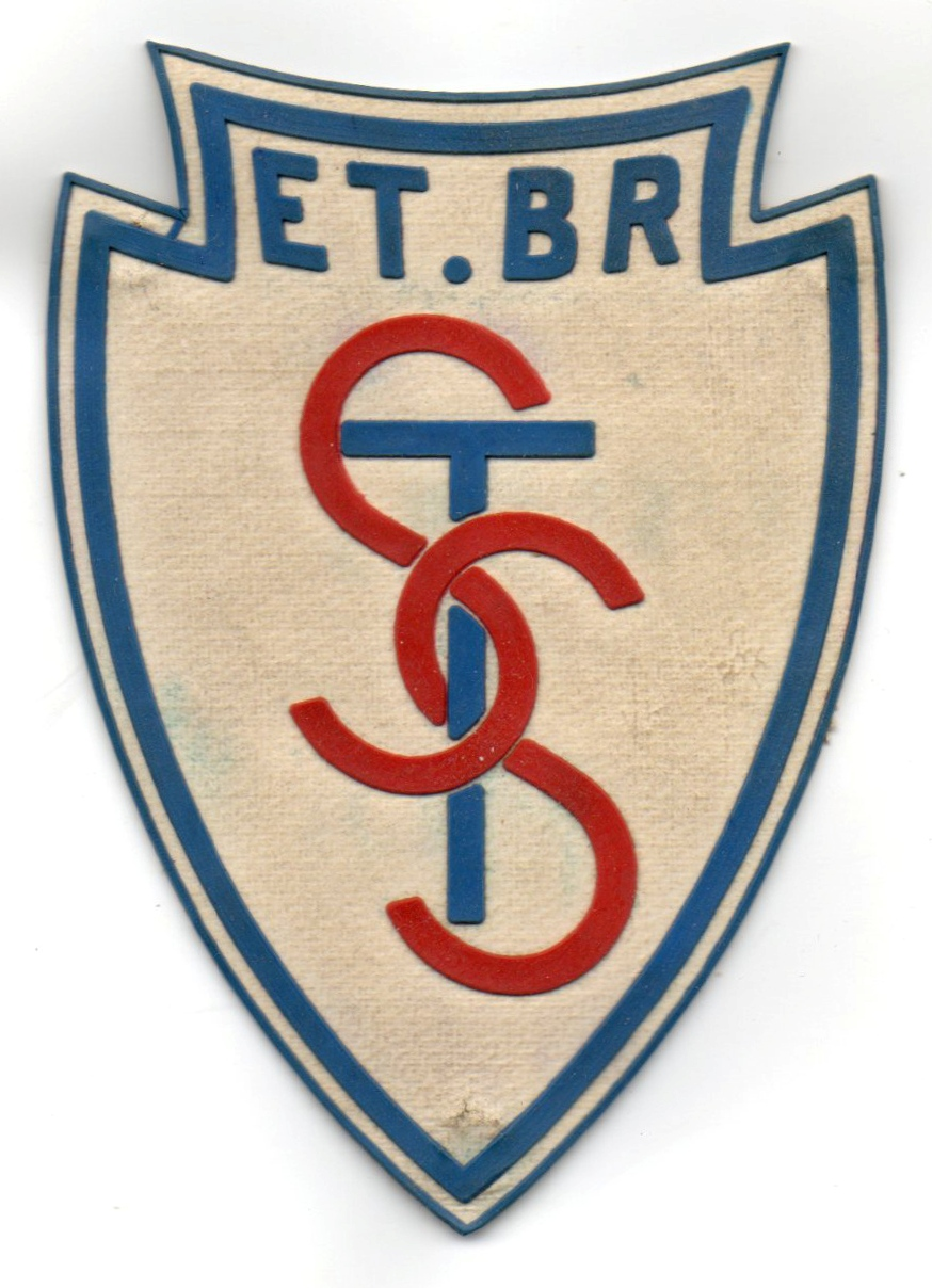 Emblème portées sur leur T-shirt par les élèves du cours de gymnastique du Collège St Stanislas (Bruxelles) dans les années 60-70.